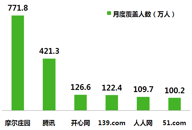 图为2009年12月中国初中及以下儿童用户社区交友网站月度覆盖人数，数据来源iUserTracker.家庭办公版2010.1, 基于20万名家庭及办公（不含公共上网地点）样本网络行为长期监测数据获得。数据来源点此。